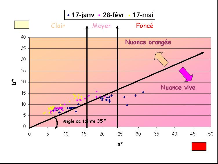 Evolution de la couleur des vins rosés d'une cave complète mesurée par chromamétrie (L,a*,b*). On constate une augmentation régulière de l'angle de teinte (la nuance du vin devient orangée)